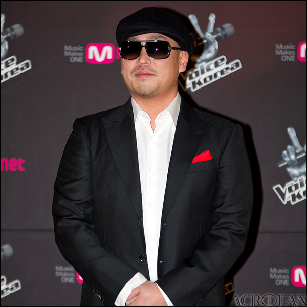 리쌍의 길. '보이스코리아' 제작발표 및 하이라이트 시사회에서